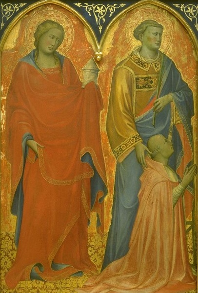 young Agnolo Acciaioli